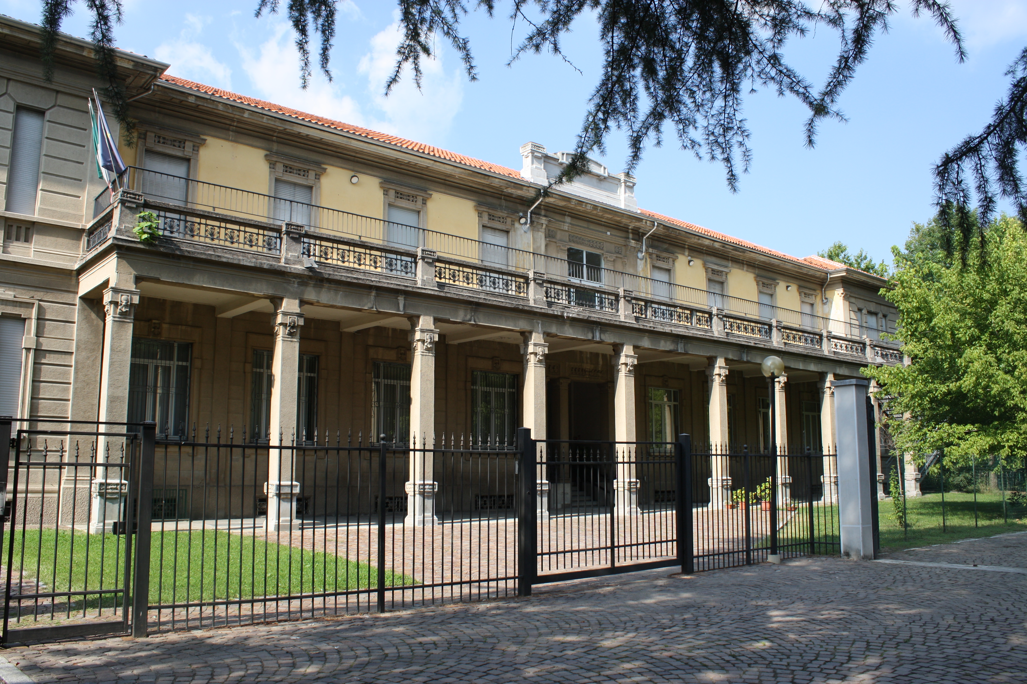 La facciata principale della villa Gonzaga di Olgiate Olona (VA) che si affaccia sul parco omonimo.